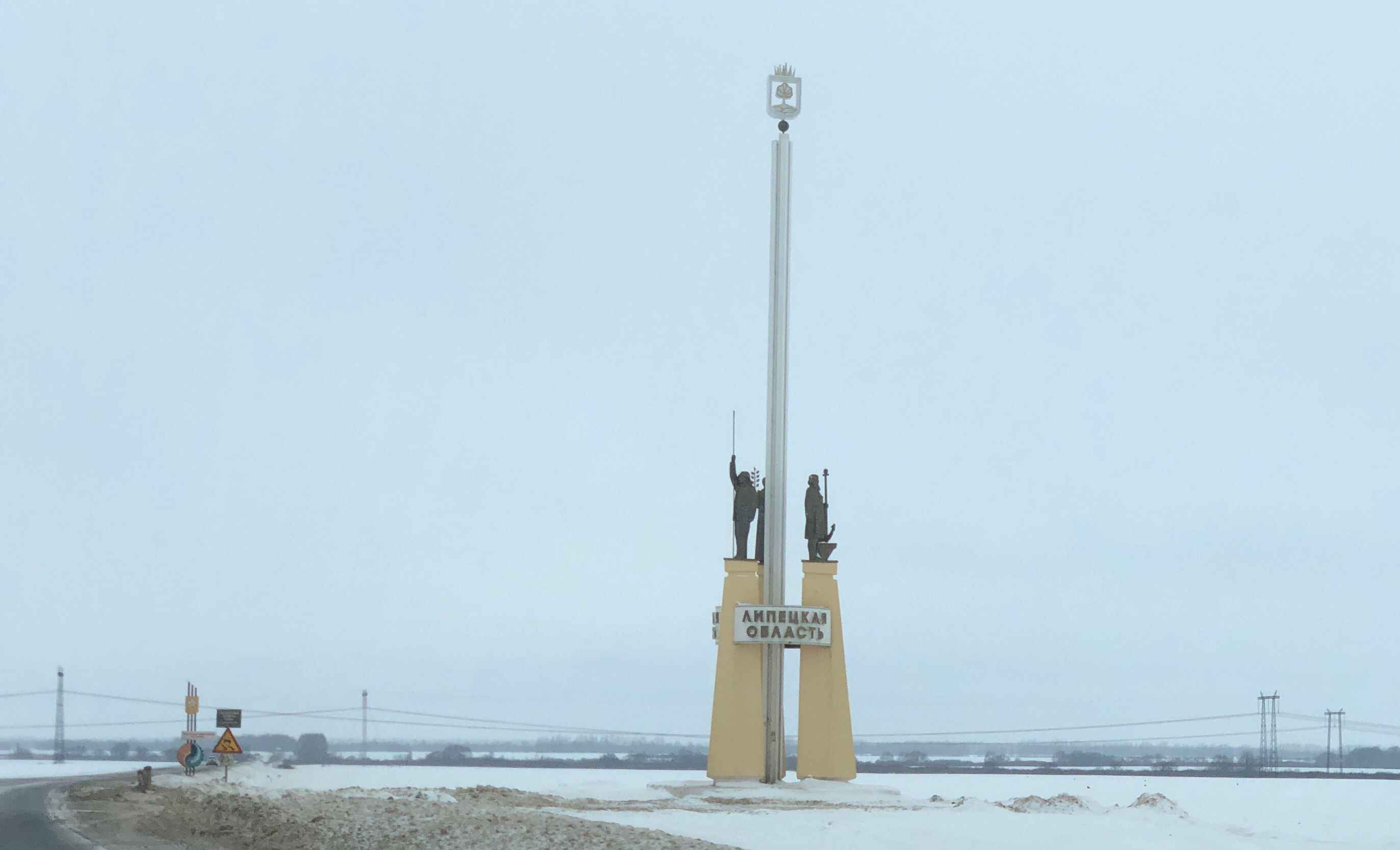 Граница Рязанской и Липецкой областей